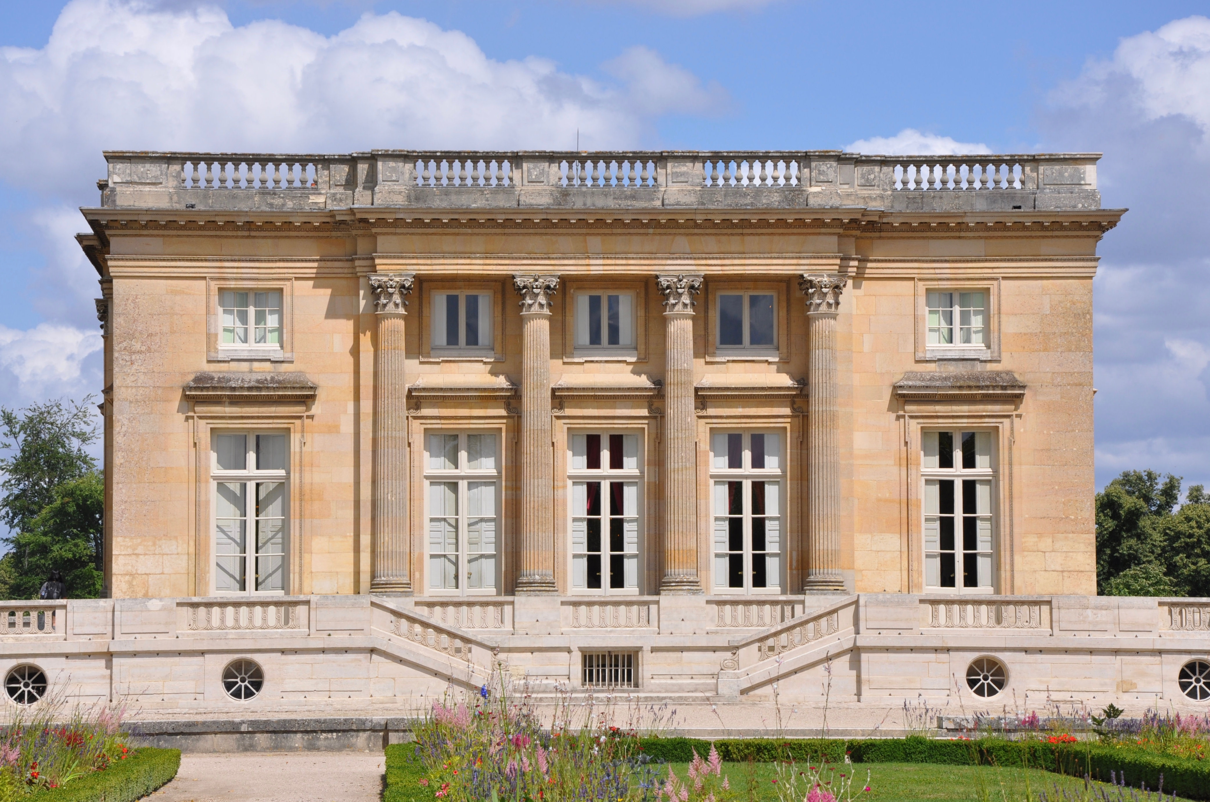 Le Petit Trianon, à Versailles - façade ouest (côté jardins)